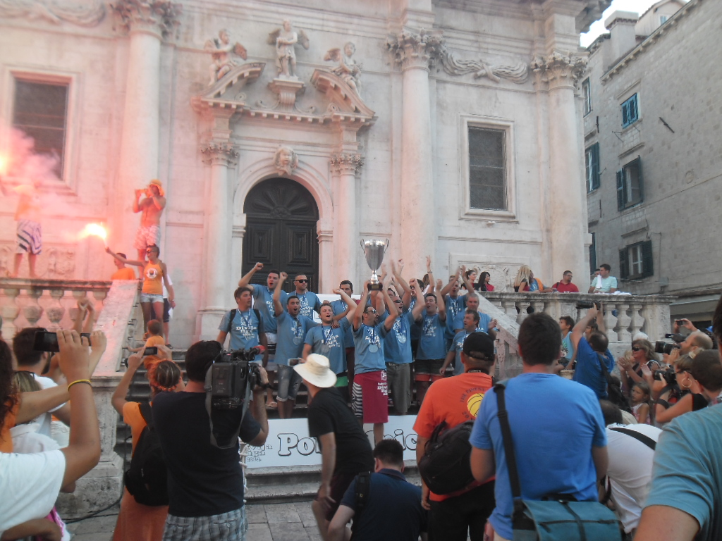 slavlje pobjednika Divlje lige FUN-a H20 iz Mlina, ispred Crkve sv. Vlaha 17. kolovoza 2014.